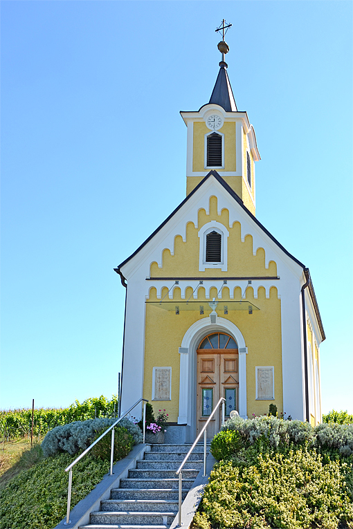 Kitzeck im Sausal Ortskapelle Neurath ObjektID: 82103